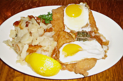 Schnitzel Holstein mit Spiegeleiern; hier als Variante zum Original-Rezept mit eingelegtem grünen Pfeffer anstelle von Kapern, sowie mit Spätzle als Beilage.